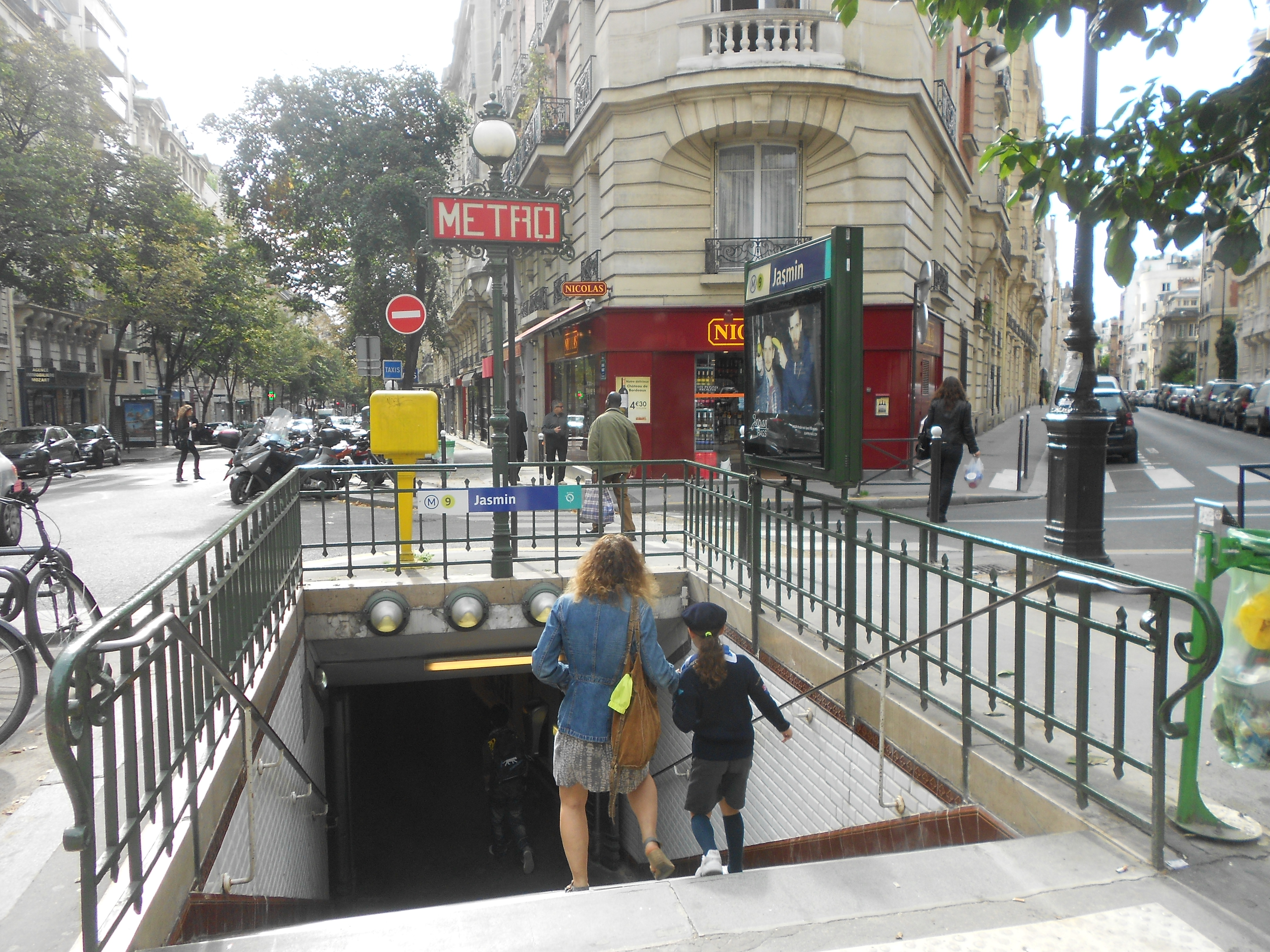 Vue de l'entrée de la station.